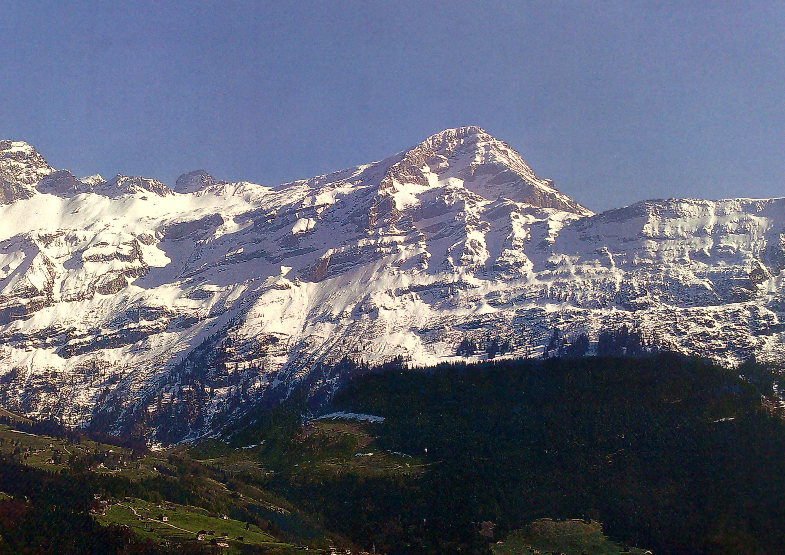 Bälmeten mit Schnee,Schattdorfer Seite